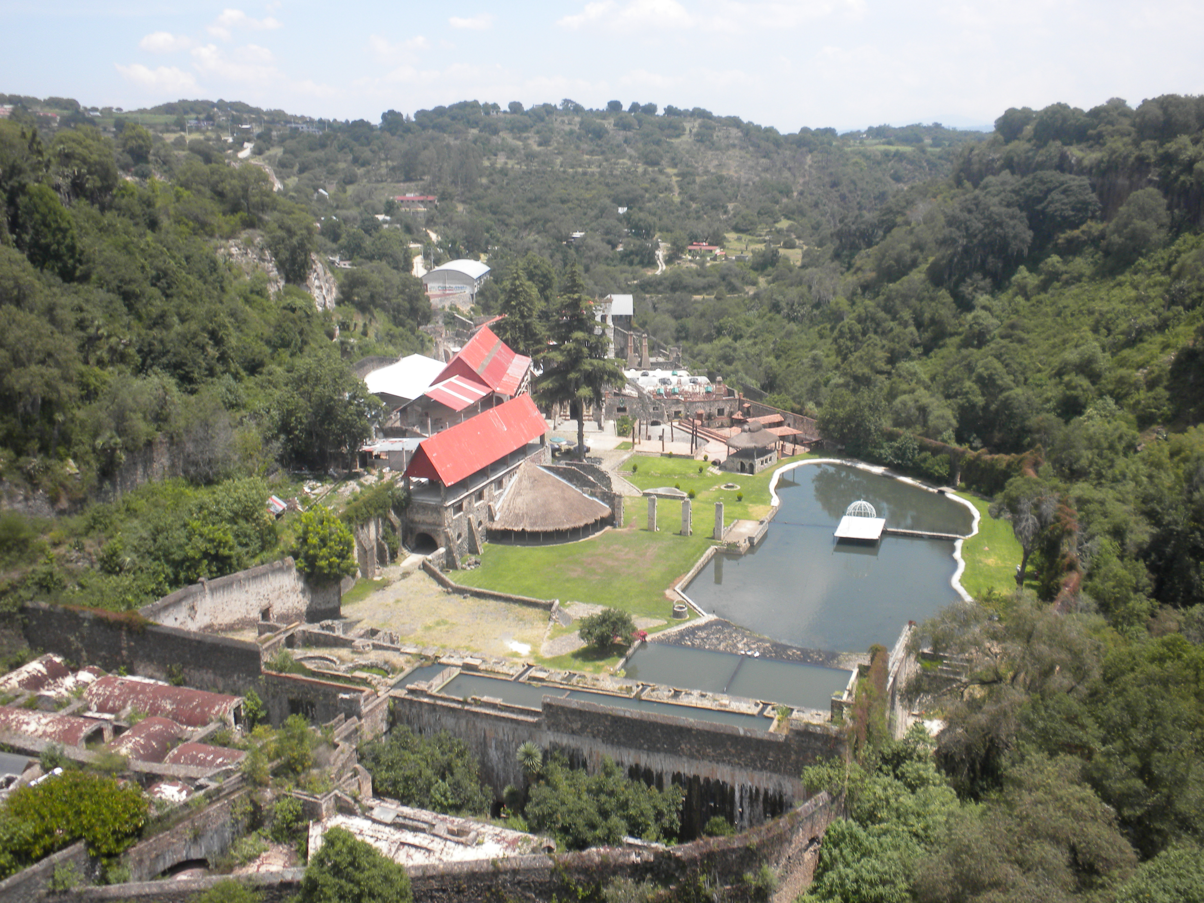 Capilla de Nuestra Señora de Loreto